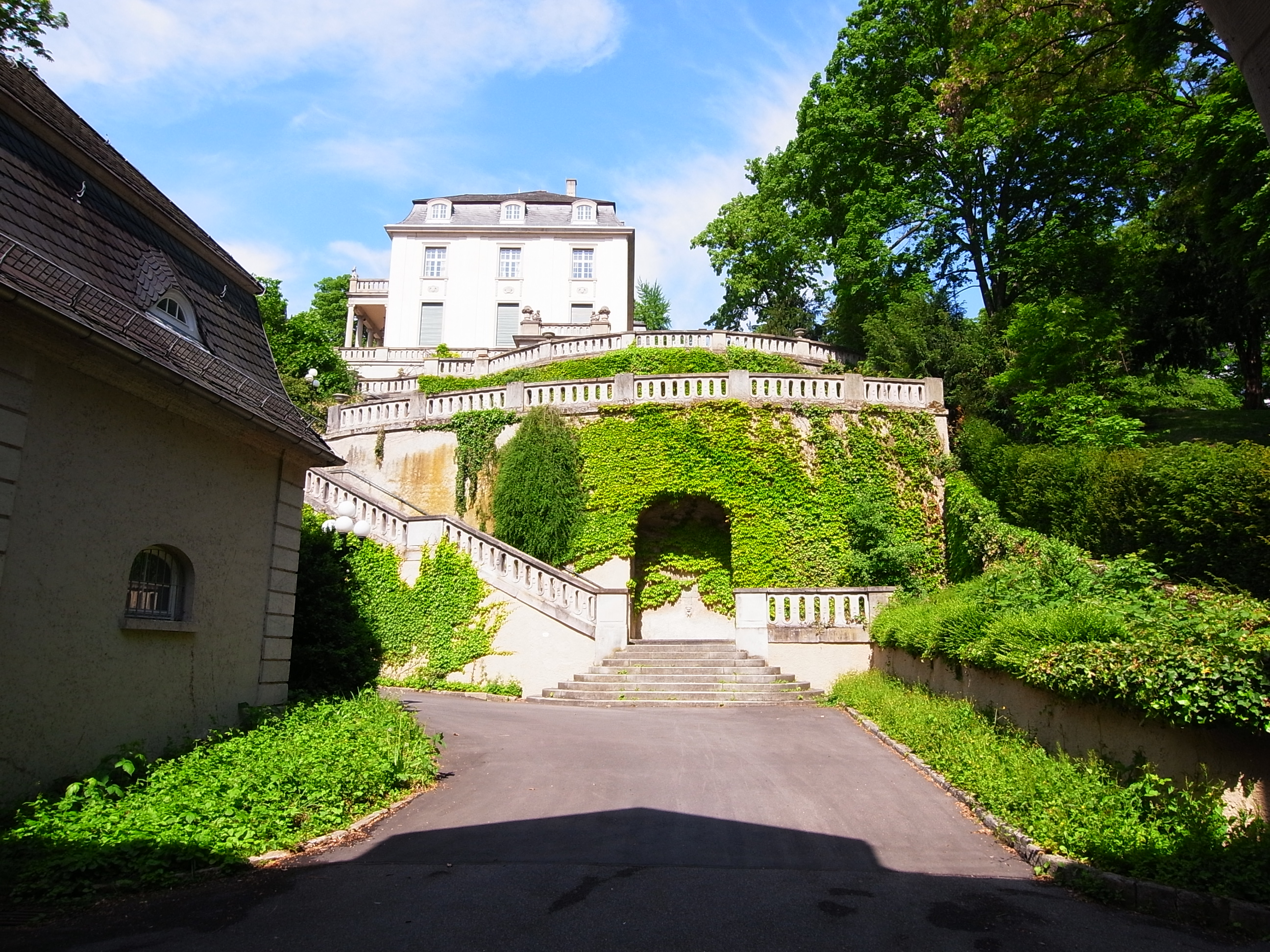 Oben - weit von der Straße zurückgesetzt ist die Villa Gemmingen zu sehen